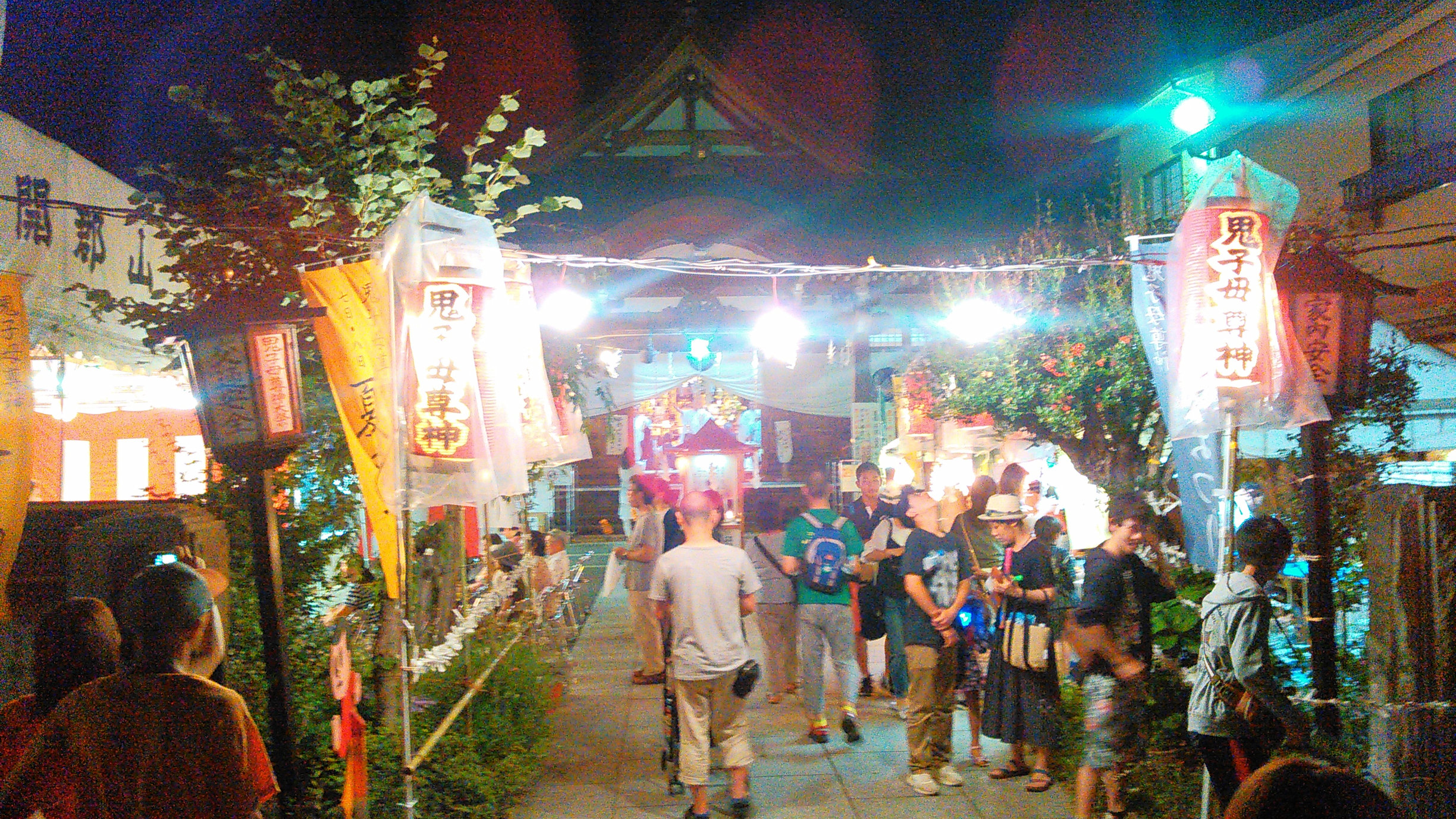 郡山市 法現寺 鬼子母神祭りの夜の本堂付近